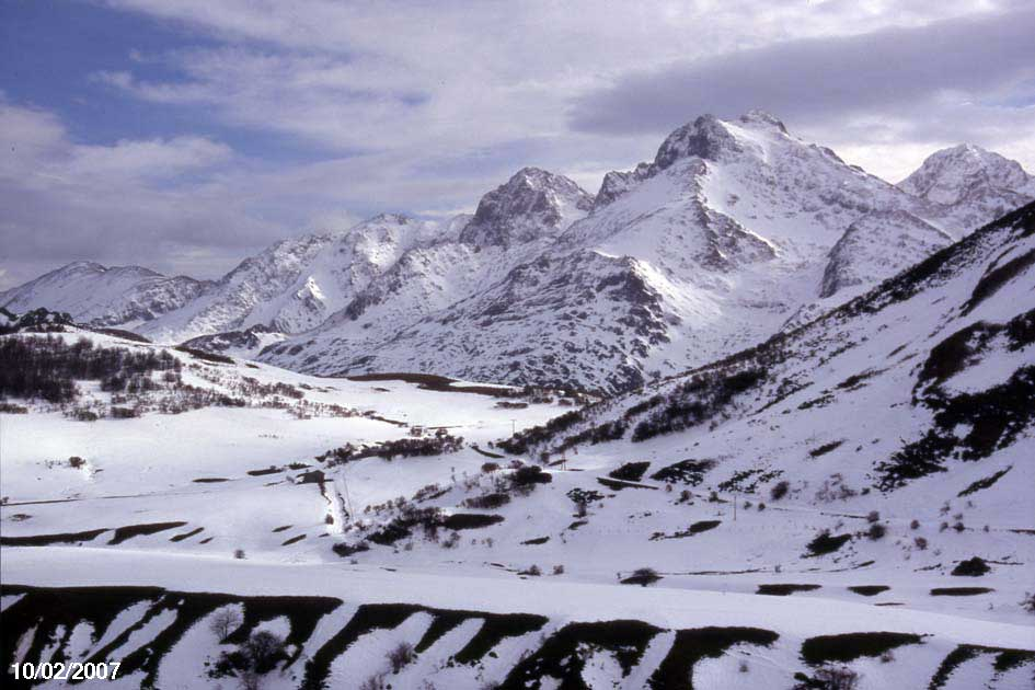 Picos de Mampodre